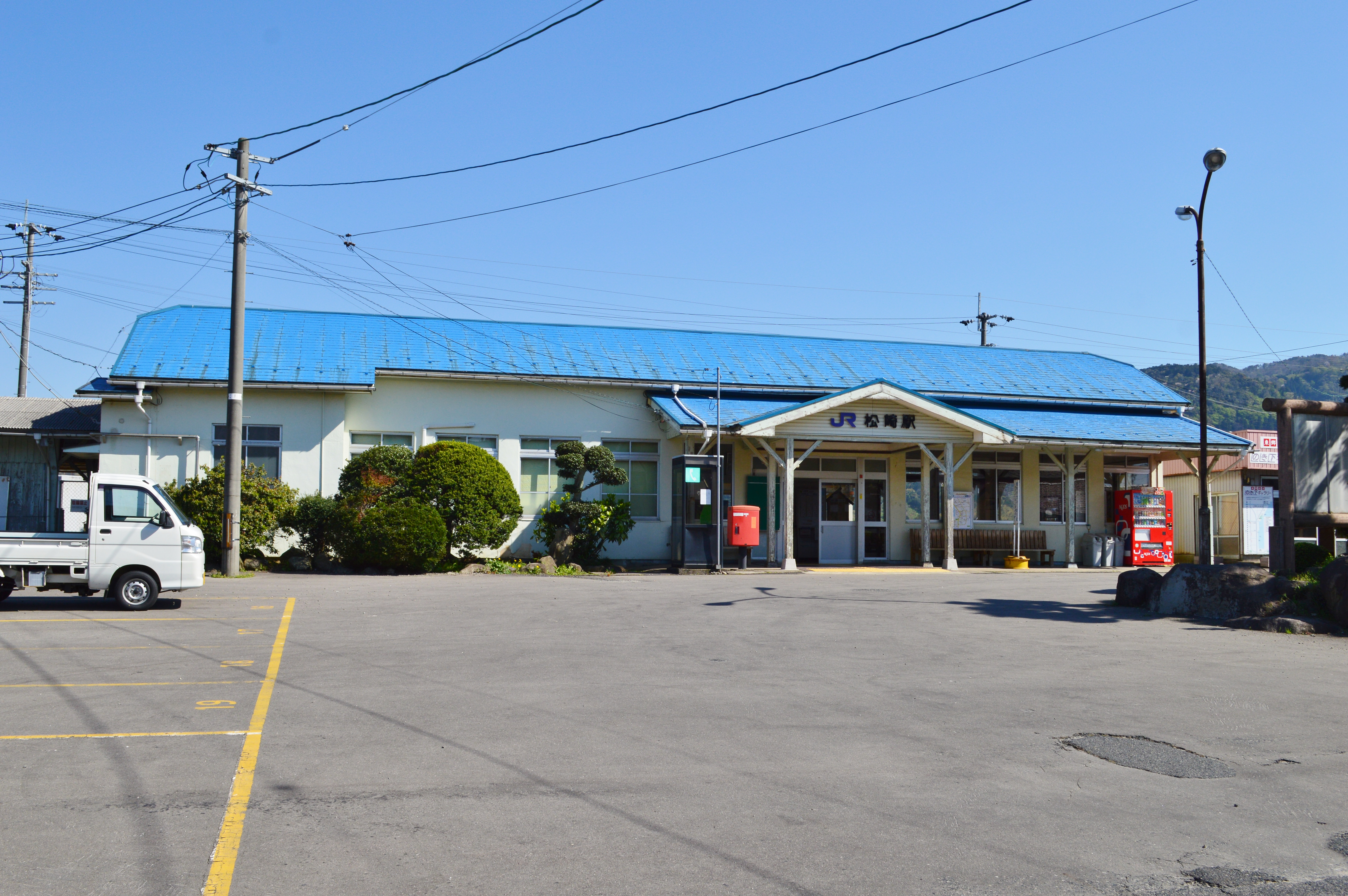 松崎駅 (鳥取県) 駅舎